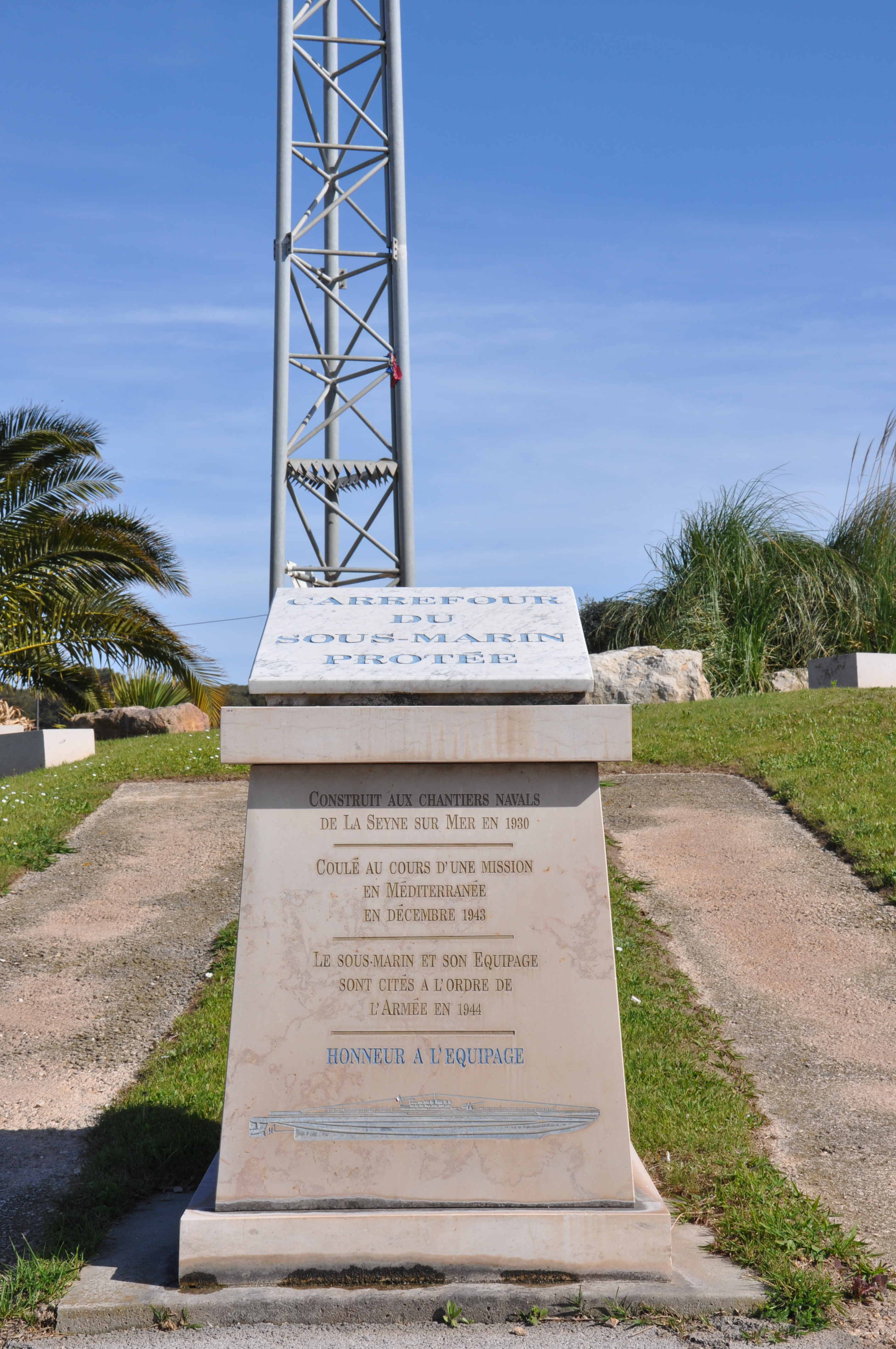 Memorial, La Seyne-sur-Mer, Provence-Alpes-Côte d'Azur, France